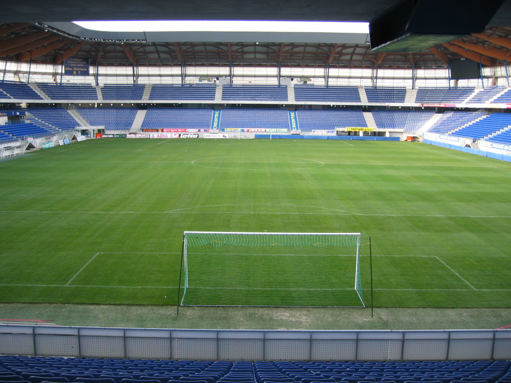 Stade Bonal Sochaux football